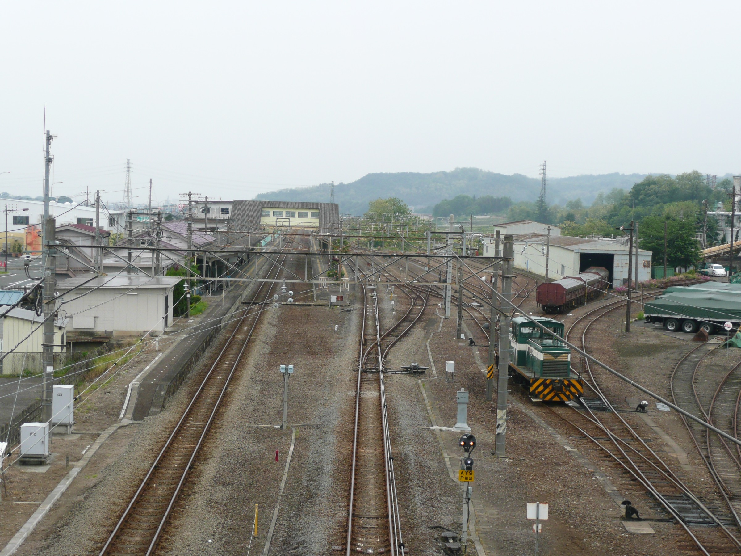 安中駅遠景